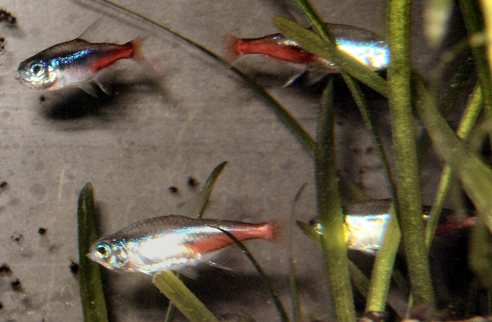 Neonfische (Paracheirodon innesi) im Aquarium